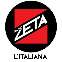 logo